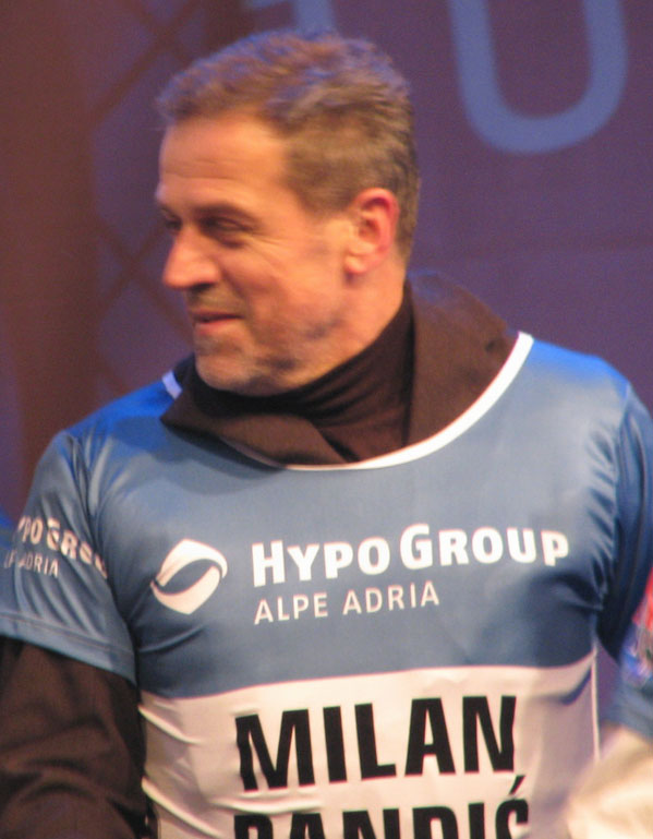 Milan Bandić